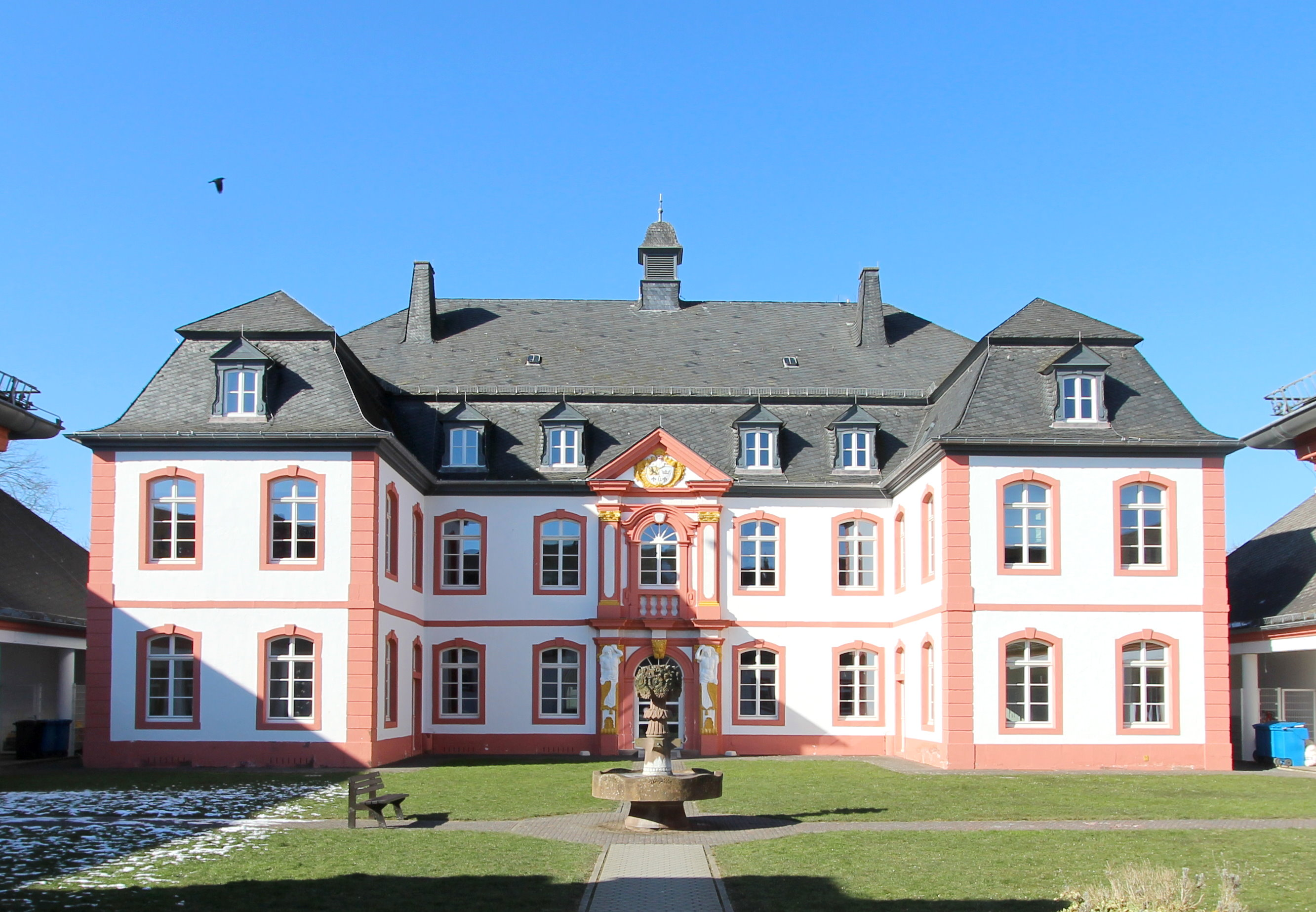 54634 Bitburg, Kölner Straße 14. Sogenanntes Schlösschen; sandsteingegliederter Dreifelügelbau mit Mansardwalmdach, bezeichnet 1764 (Chronogramm), nach Kriegszerstörung 1957–59 wiederhergestellt. Die mittlere Achse der Ehrenhoffront wird von einem zweigeschossigen Aufbau gerahmt. Der Fries ist mit dem Chronogramm SOLI DEO LAVS HONOR GLORIA ET GRATIARVM ACTIO (= 1764) versehen. Heute beherbergt es die St. Martin Förderschule. Aufnahme von 2018.